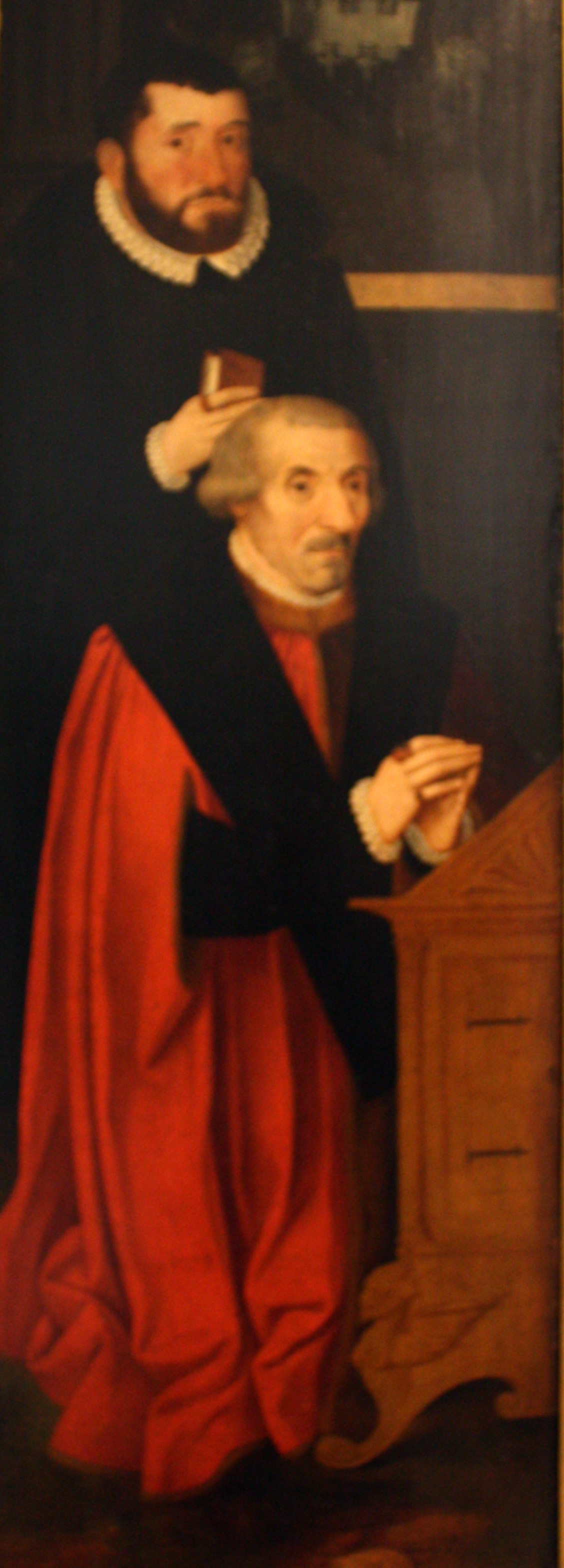 Gotfried Hittorf und sein Sohn Kaspar. Hittorf war Geschäftsmann, Ratsmitglied, und mehrfach (5x) Bürgermeister der Stadt Köln